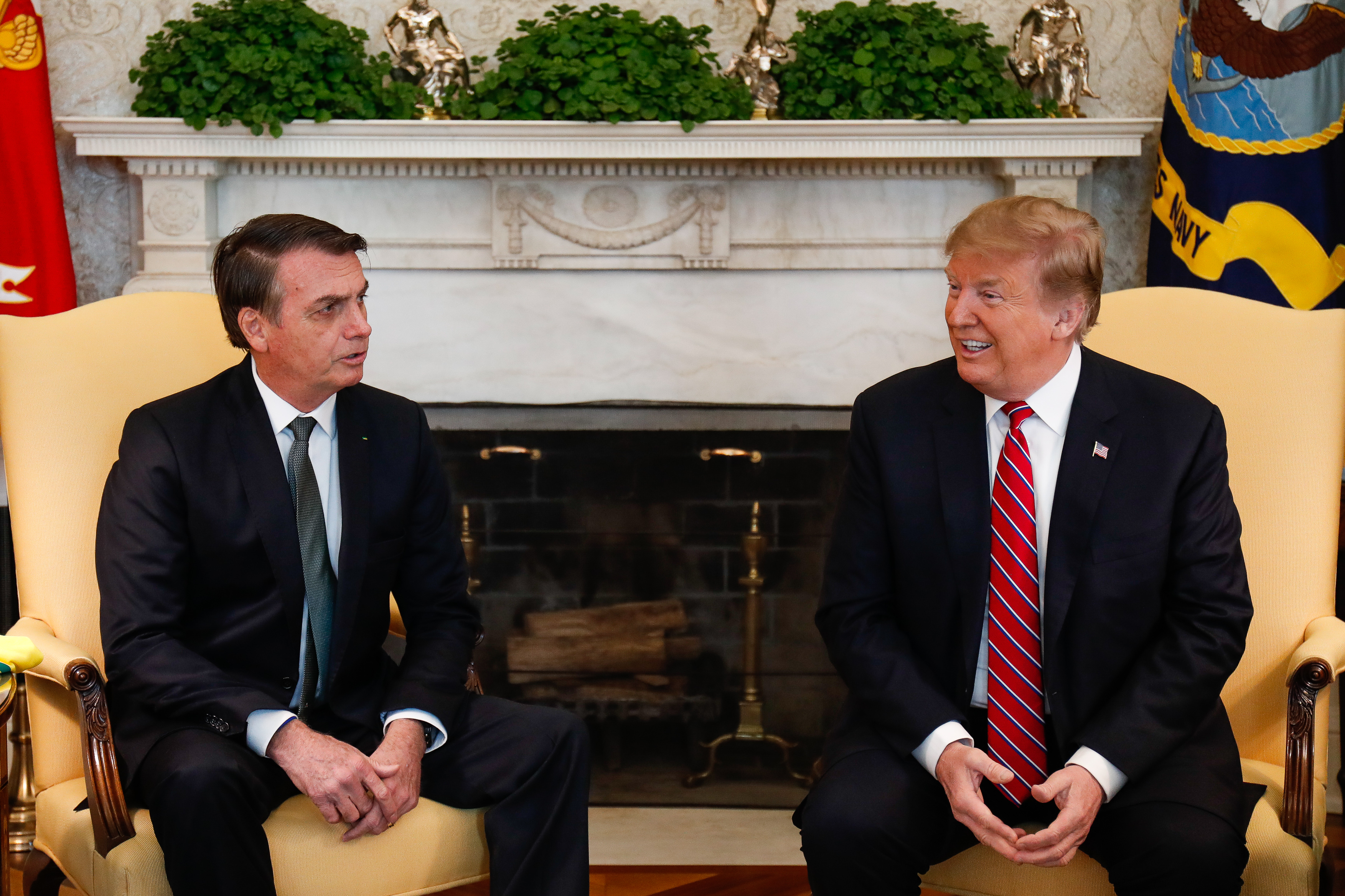 (Washington, DC - EUA 19/03/2019) O Senhor Donald Trump, Presidente dos Estados Unidos da América e o Presidente da República Jair Bolsonaro. Foto: Alan Santos/PR